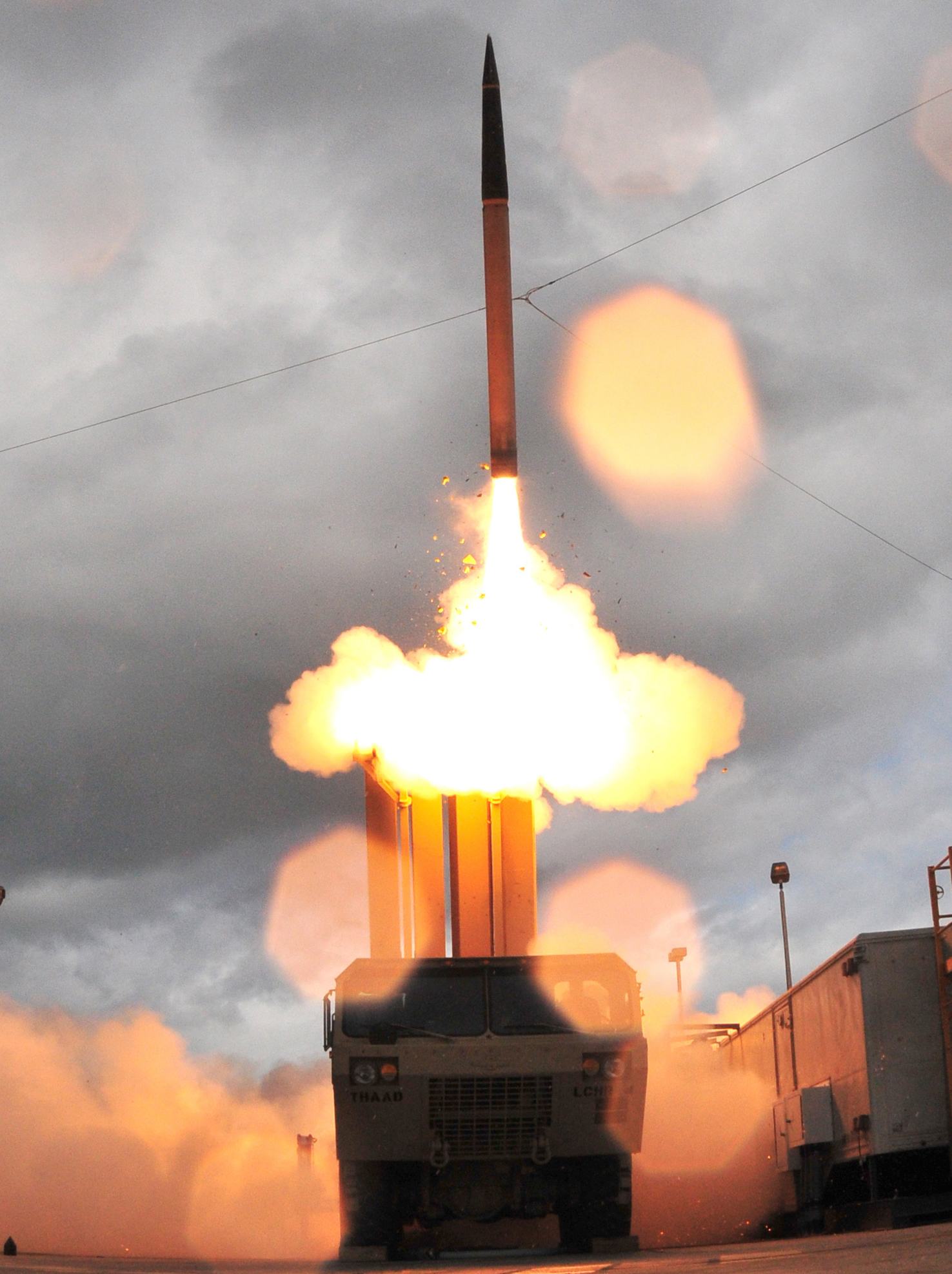 Pocisk systemu THAAD w trakcie startu testowego.